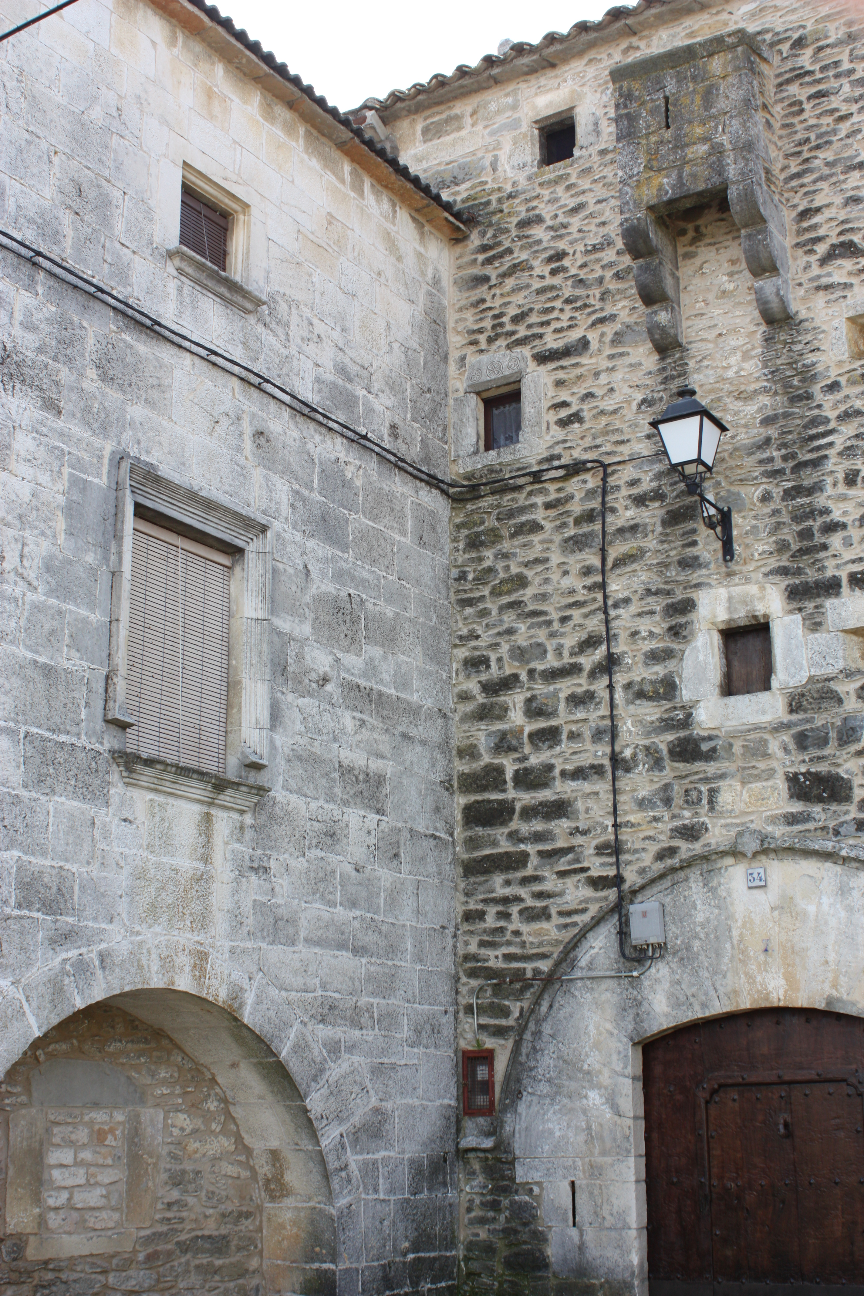 Detalle de volúmenes adosados que unifican la construcción